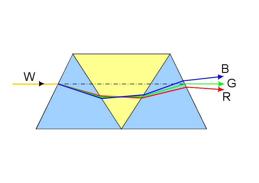 Schematischer Strahlengang im Geradsichtprisma